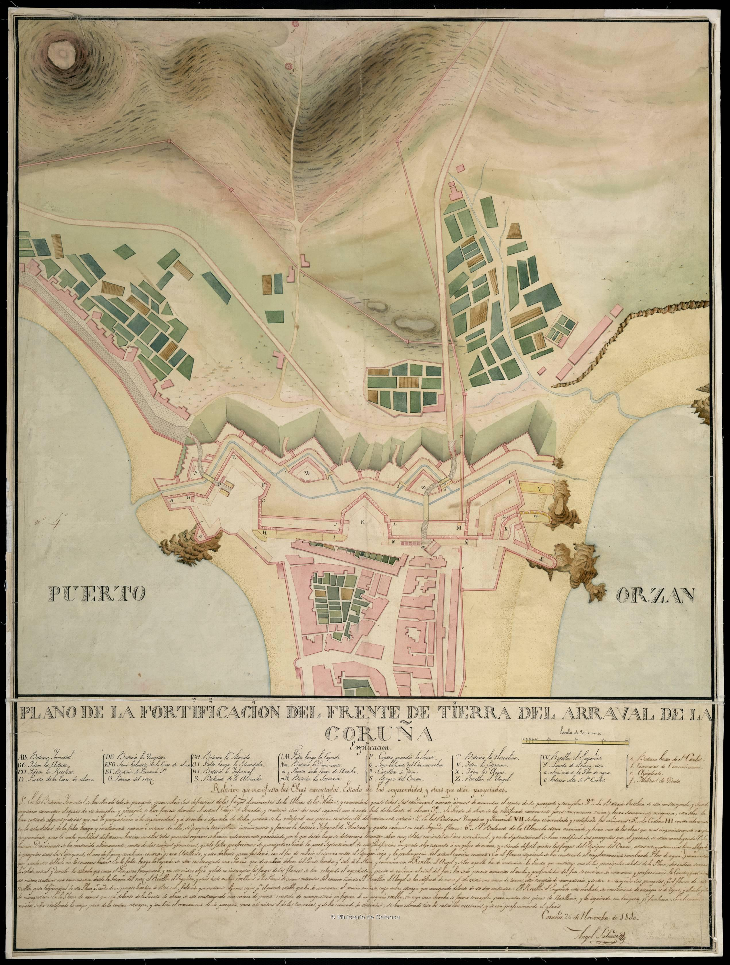 Visto bueno de "Franco. Serrallach". Manuscrito firmado y rubricado por el autor. A plumilla en tinta negra y coloreado a la acuarela en carmín, azul y siena Relieve representado por sombreado. Relación de las puertas, baterías, baluartes, contraguardias, espigones, etc, de la fortificación indicada por clave alfabética. Nota explicativa en la que se señala el estado de las obras ejecutadas, de las obras emprendidas y en proyecto de realización.